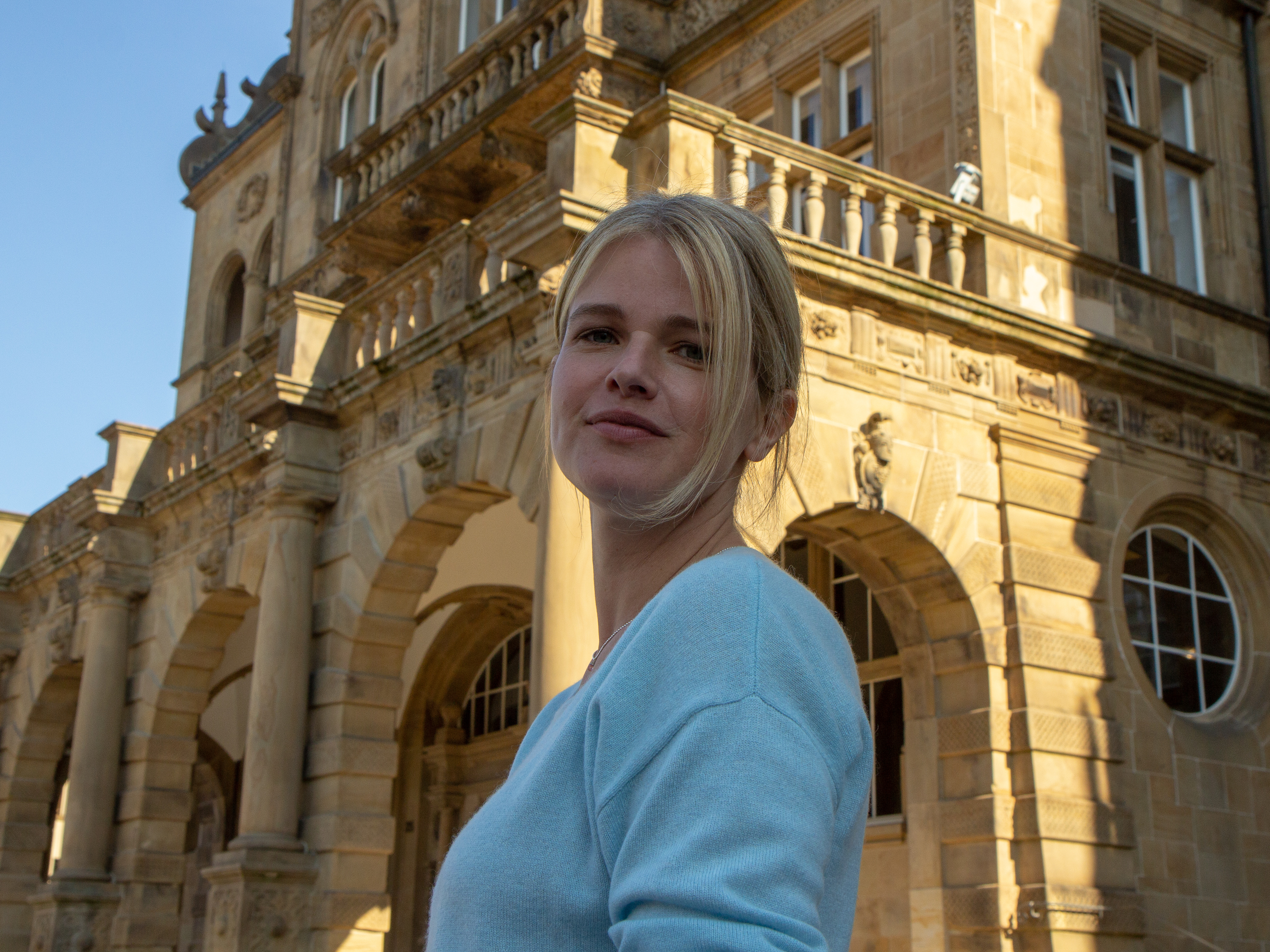 Pressetermin am Set "Wilsberg" am Alten Rathaus in Bielefeld am 15. Oktober 2018. Schauspielerin: Mira Bartuschek